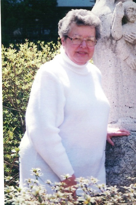 Vlasta Svobodová (1998)